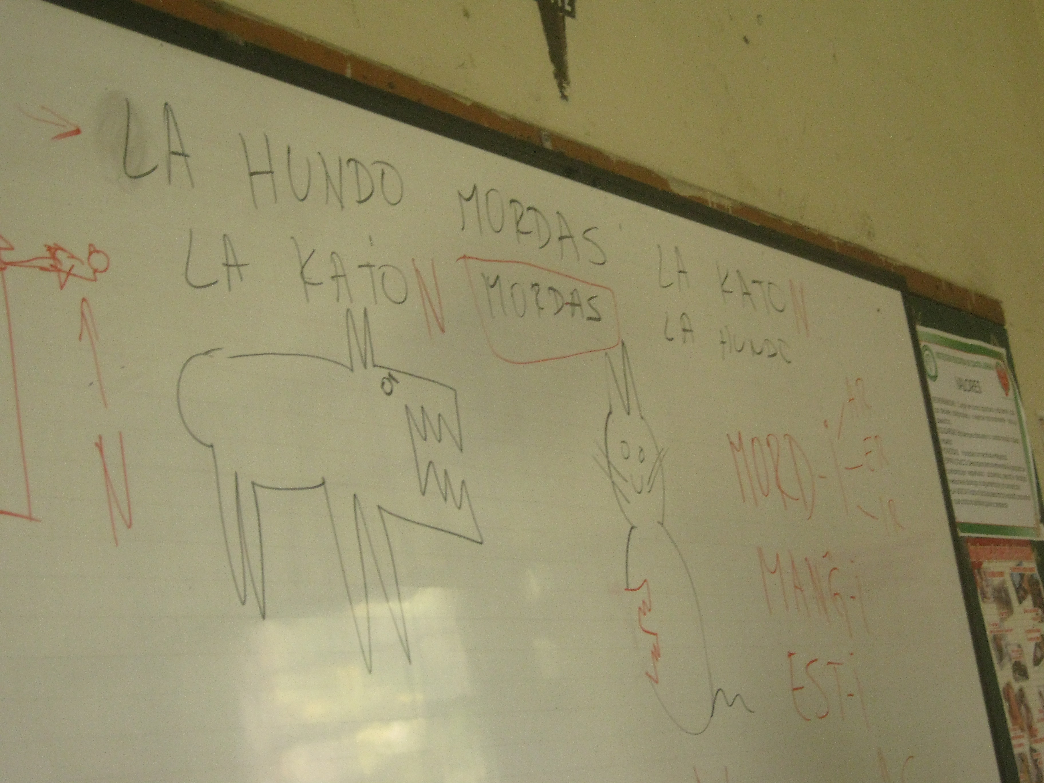 Enseñando el acusativo del EsperantoEsperanto: Instruante la akuzativon